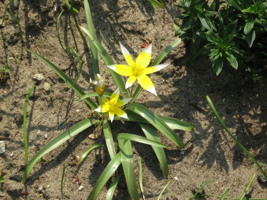 Tulipan (Tulipa tarda Stapf) z mojego ogrodu